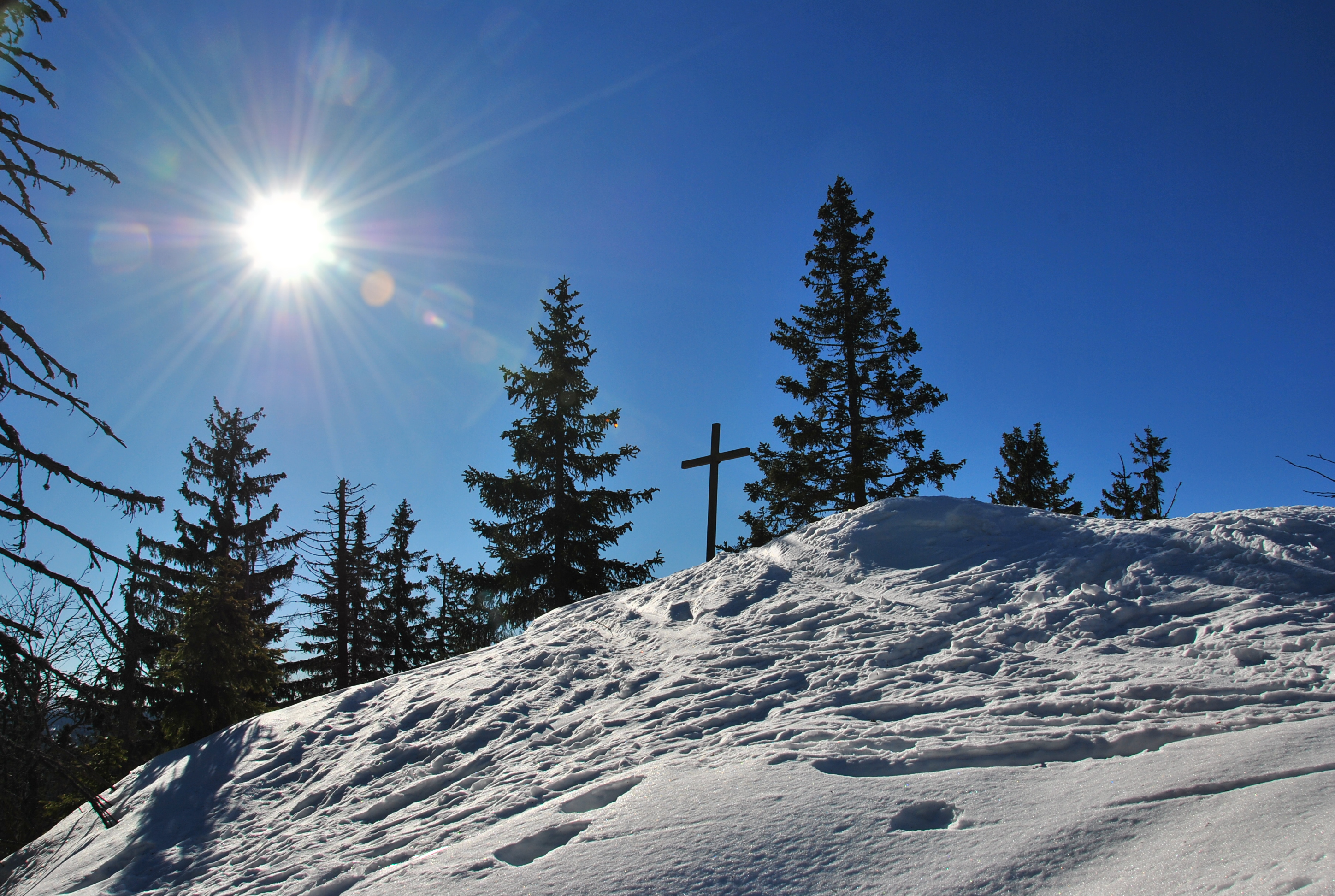 Hahnenbogen, Bavarian Forest